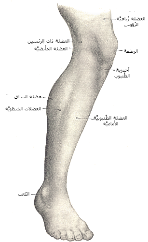 منظرُ جانبيًّ لِلرجل اليُمنى.